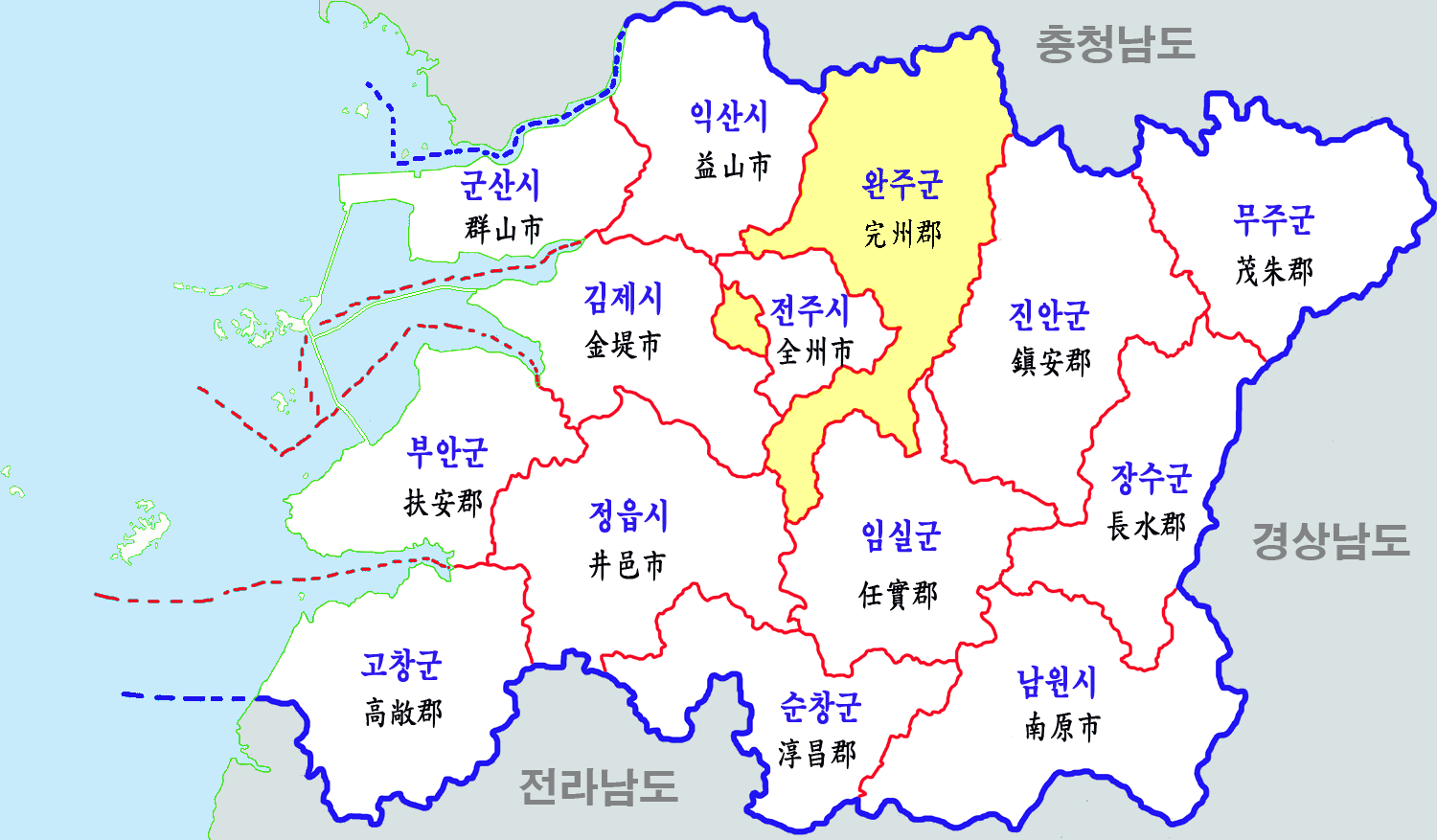 전라북도 행정구역